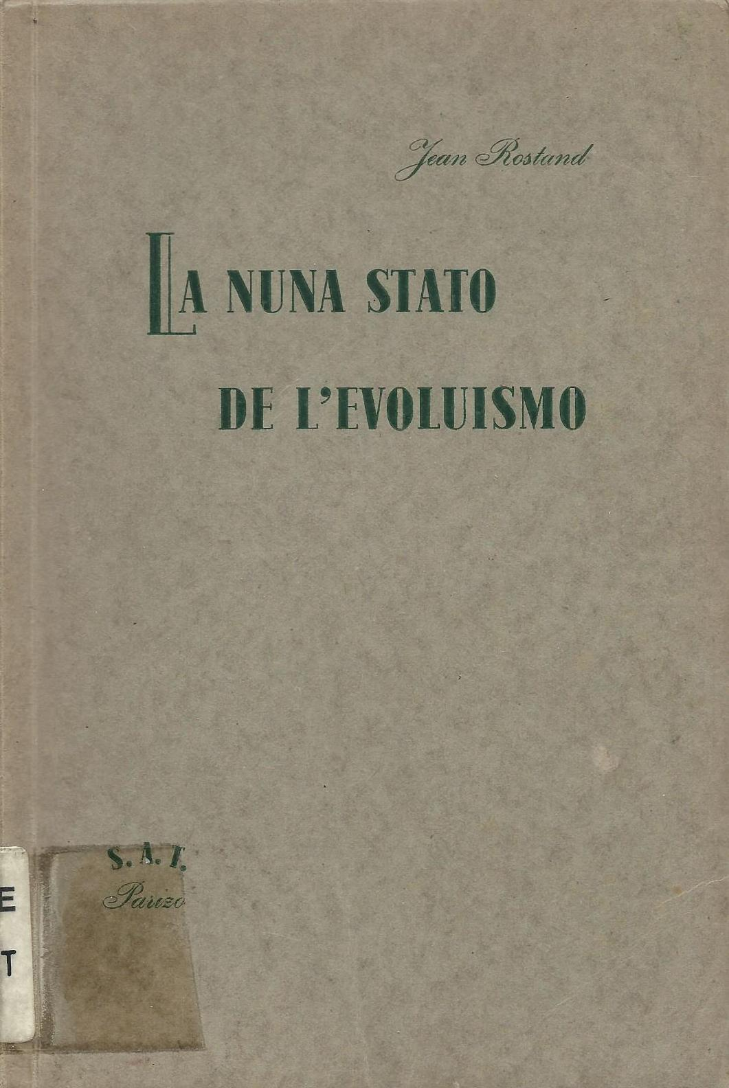 librokovrilo de libro "La Nuna Stato de l' Evoluismo", 1950